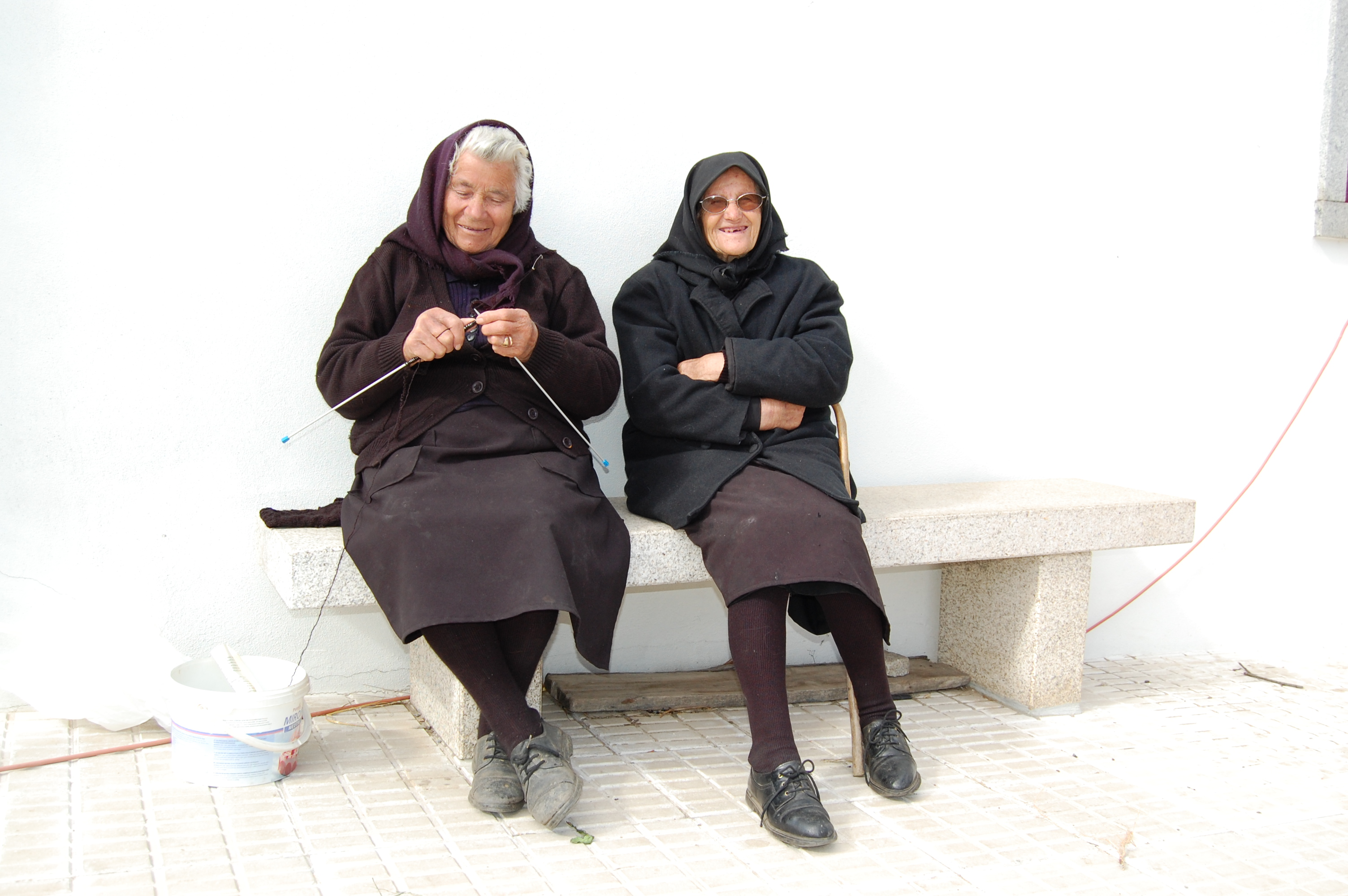 Duas típicas mulheres transmontanas em Malhadas, concelho de Miranda do Douro, Portugal.